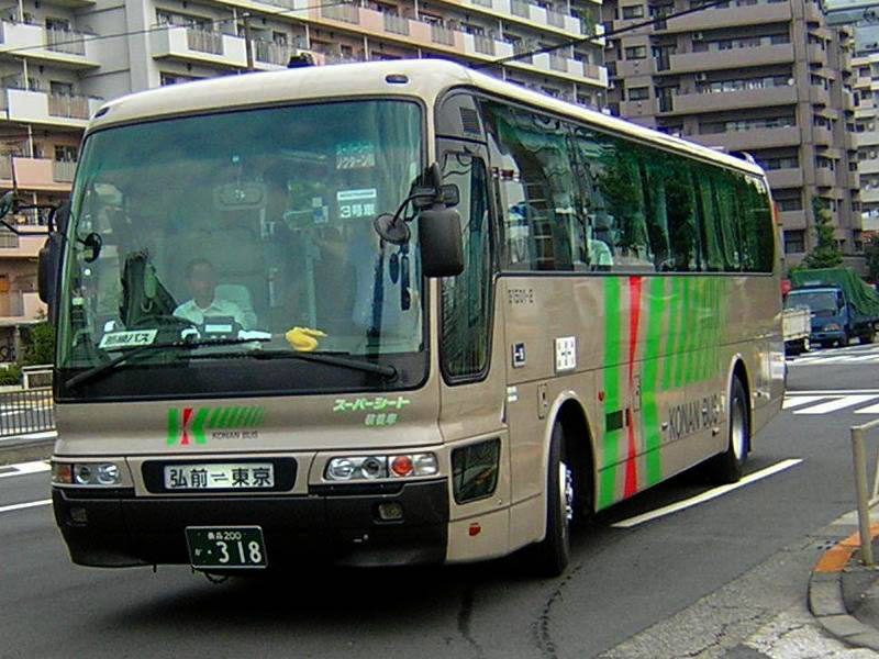 ノクターン号用・スーパーシート設置車両 2005年8月11日 品川バスターミナル付近で撮影 弘南バス弘前営業所所属 登録番号 青森200か・318